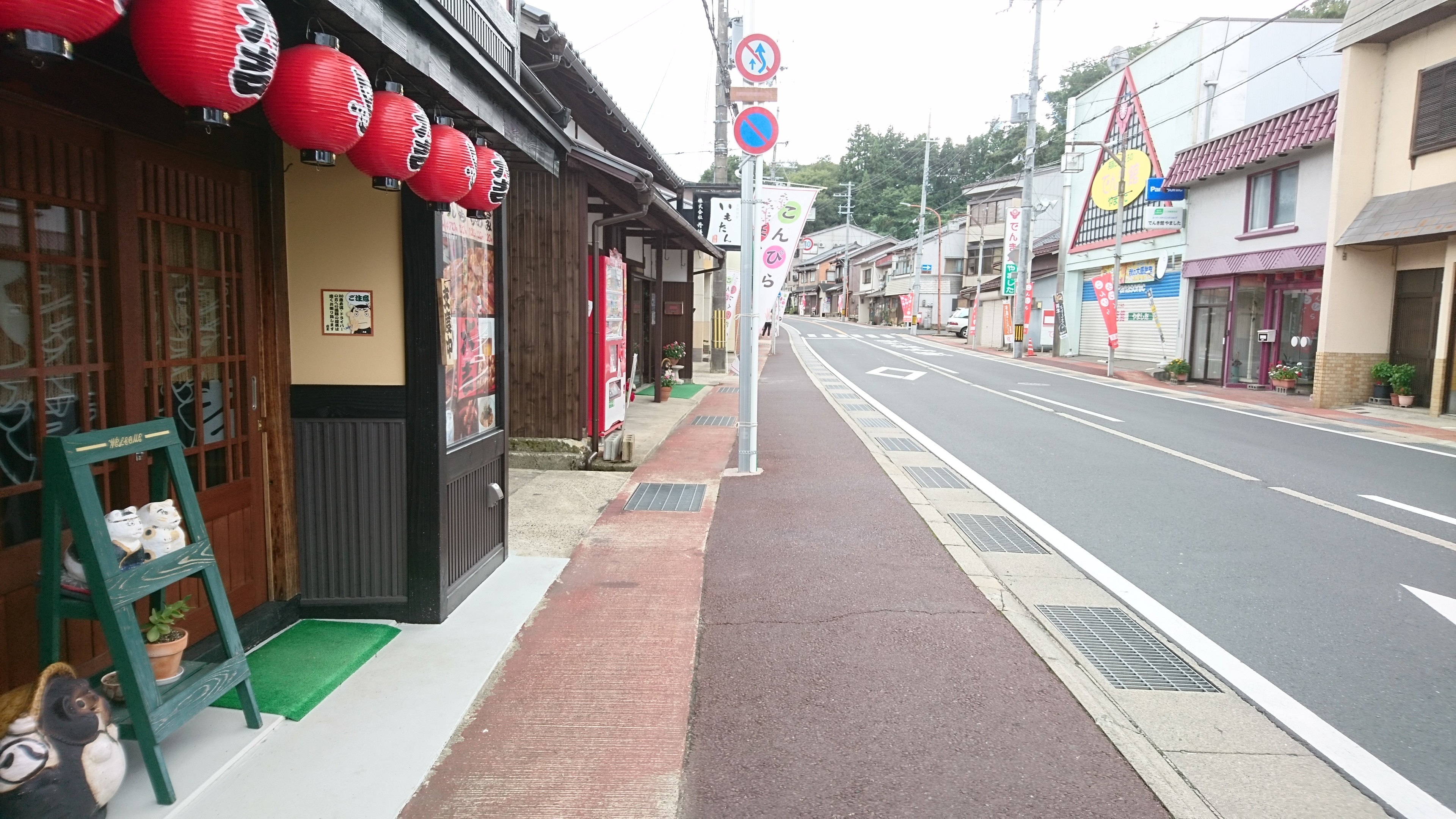 まちなかエリア（左の飲食店の前に素焼き狛猫が飾られている。）